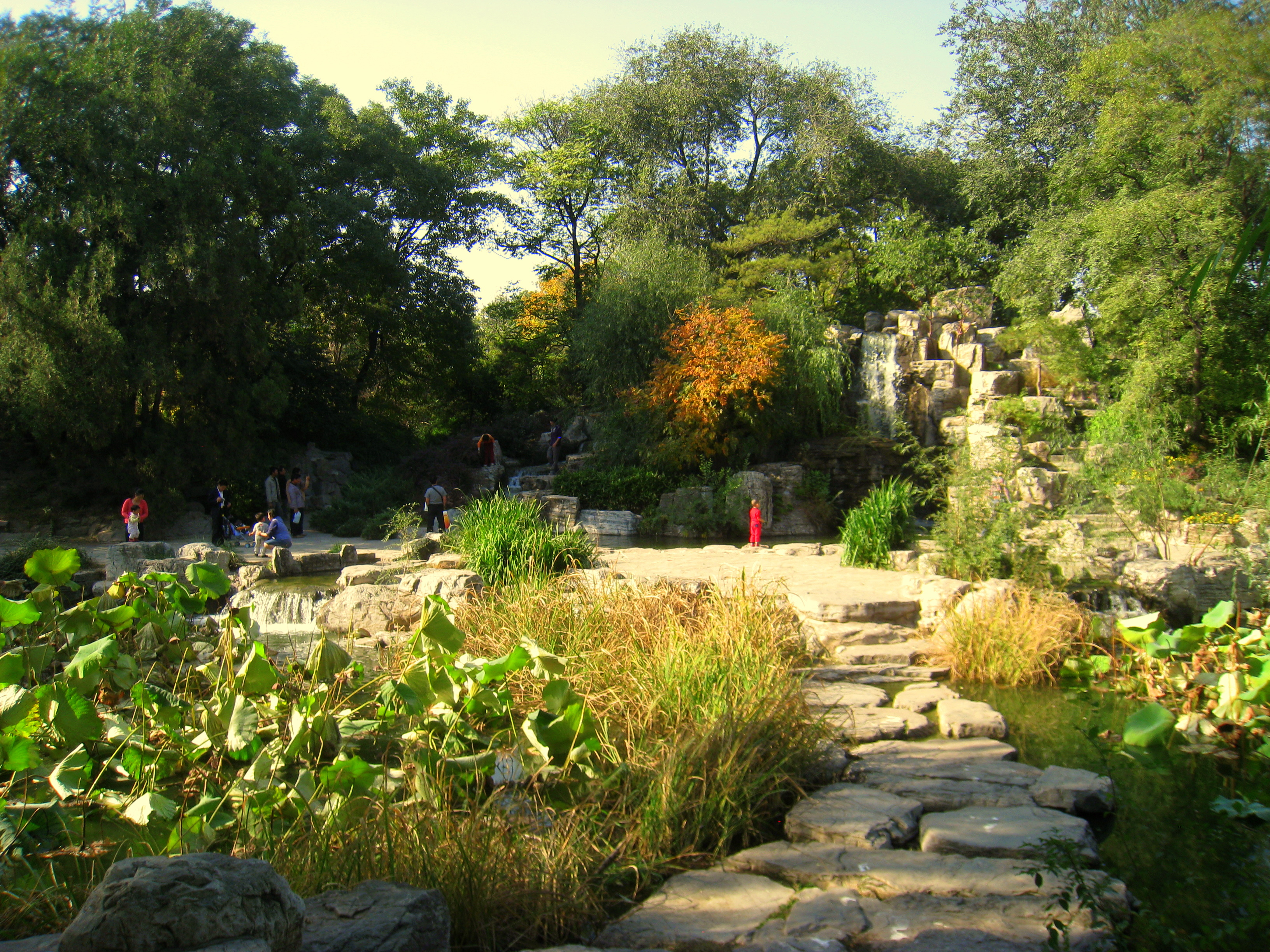 Beijing Zoo (北京动物园), Beijing, China.